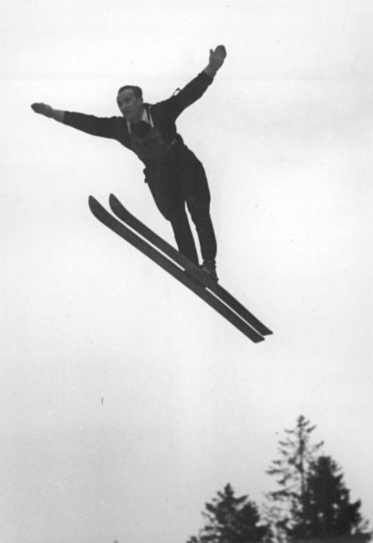 Illus Quaschinsky 13.2.51 Die 2. Wintersportmeisterschaften der Deutschen Demokratischen Republik vom 11.-18.2.51 in Oberhof UBz: Beim Spezialsprunglauf-Schauspringen: Leopold Tajner (CSR) beim Sprung